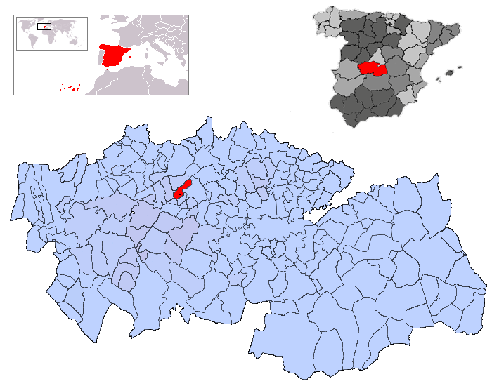 Otero en la provincia de Toledo